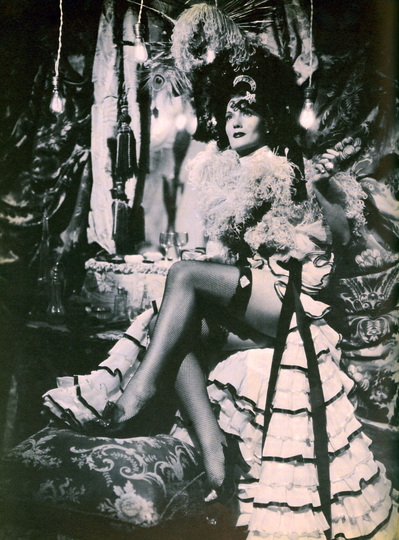 Isa Miranda (1909 – 1982) was an Italian actress, screenshot film Zazà (1944), di Renato Castellani